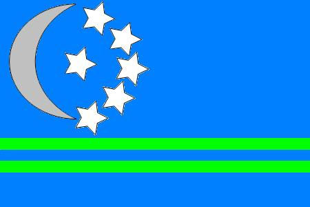 Bandera Municipal de Osa